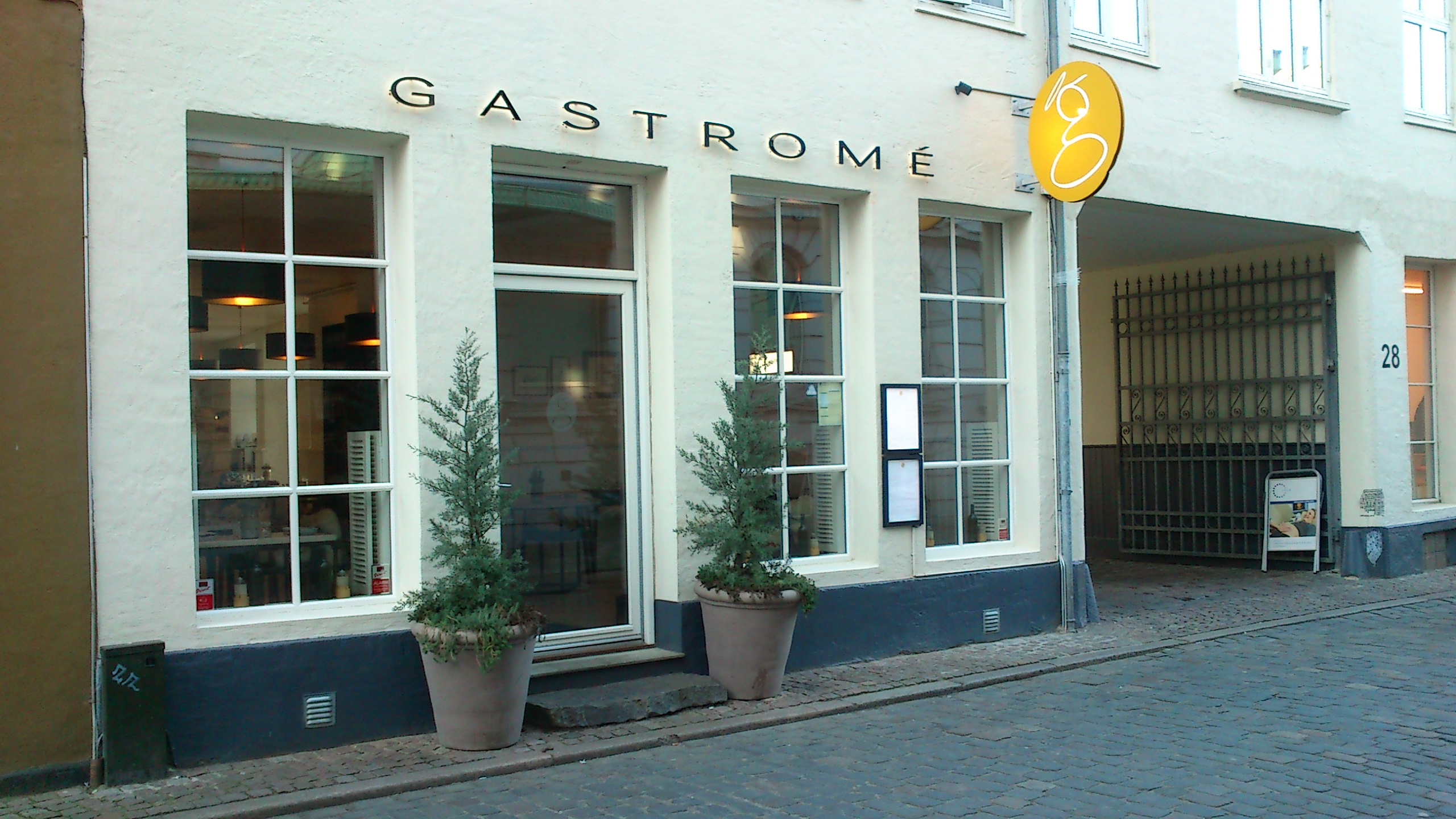 Restaurant Gastromé i Rosensgade 28 i Aarhus.